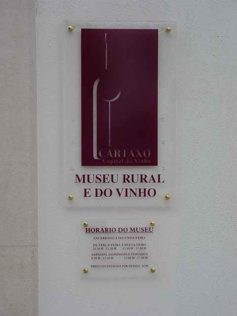 Entrada do Museu Rural e do Vinho do Concelho do Cartaxo, com o logotipo do projecto "Cartaxo, Capital do Vinho".